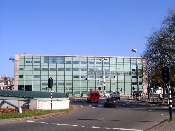 NFTA